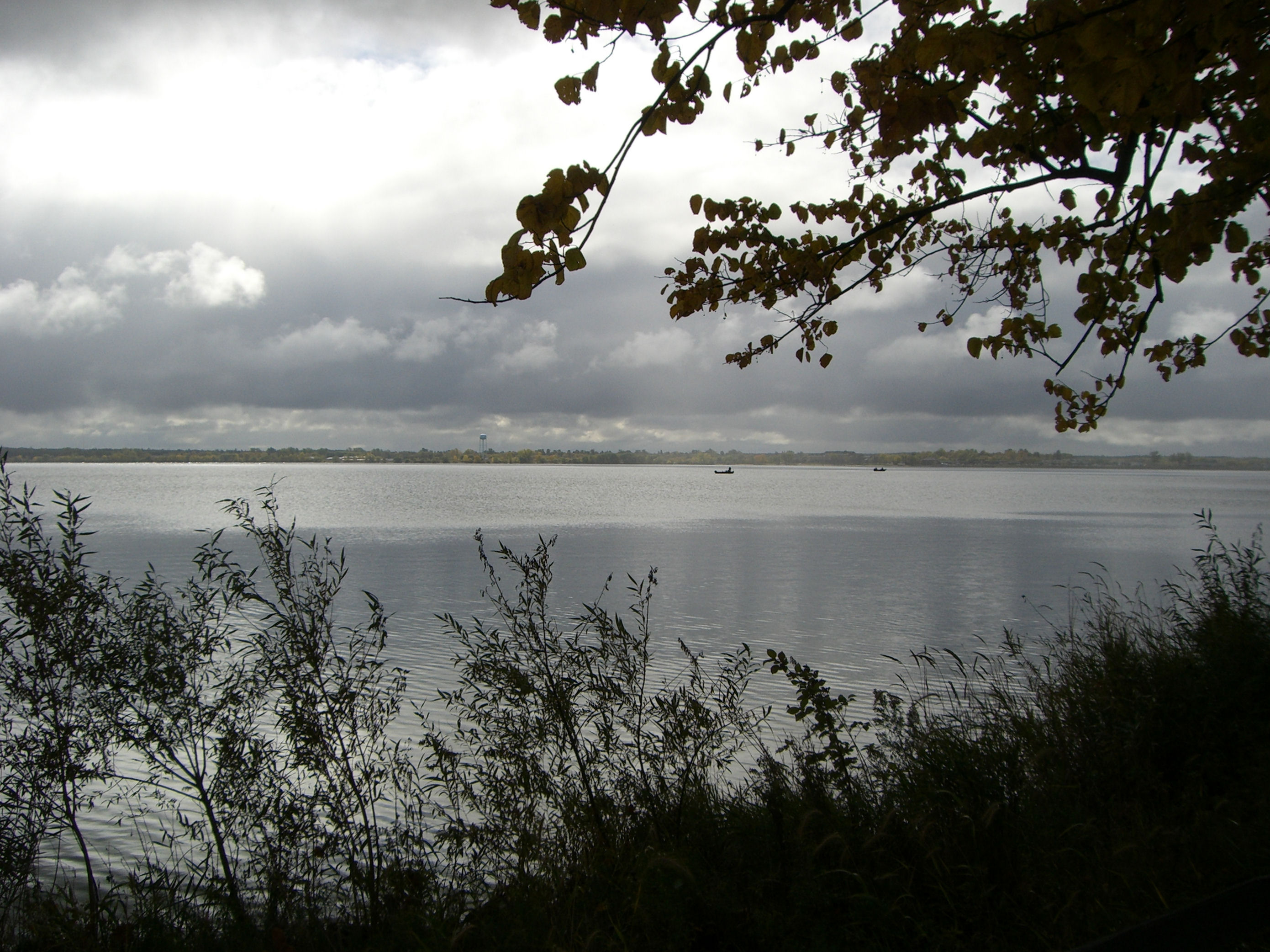 Lake Bemidji (MN) in fall